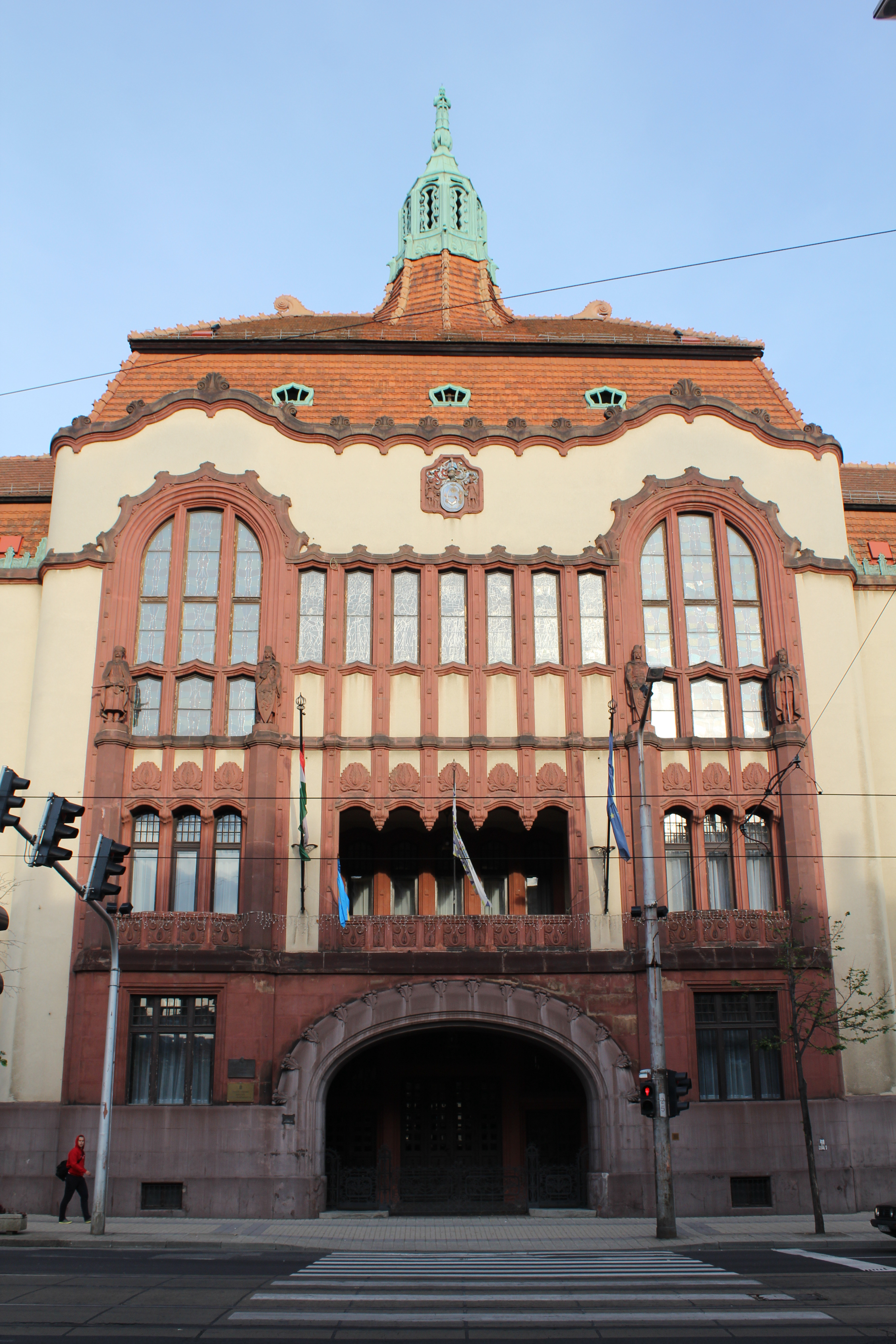 Vármegyeháza This is a photo of a monument in Hungary. Identifier: 5263